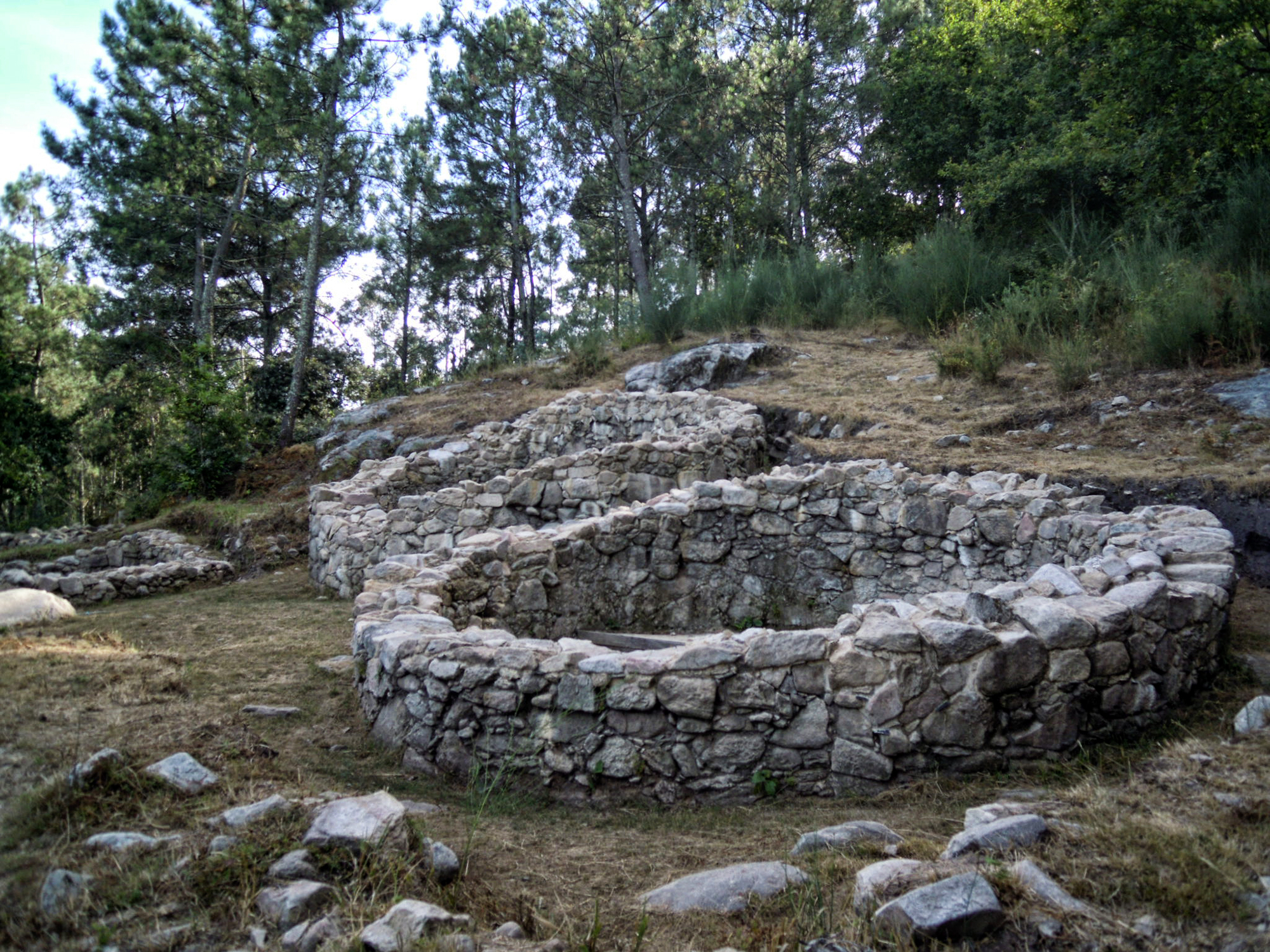 Castro da Subidá, no concello de Marín.